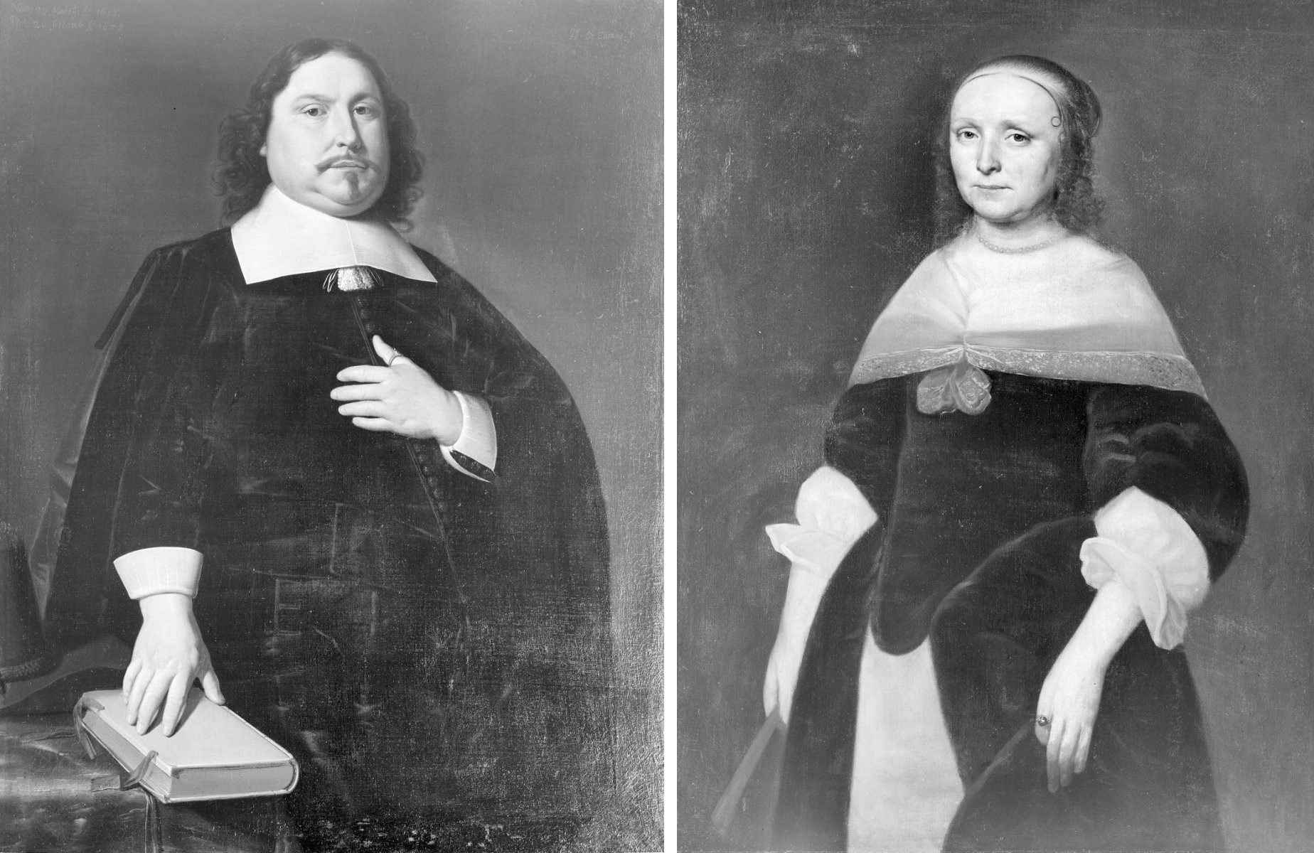 Pendant van een portret van burgemeester G.ten Berge door Stomme en het portret van zijn vrouw Houwke van Vreeden